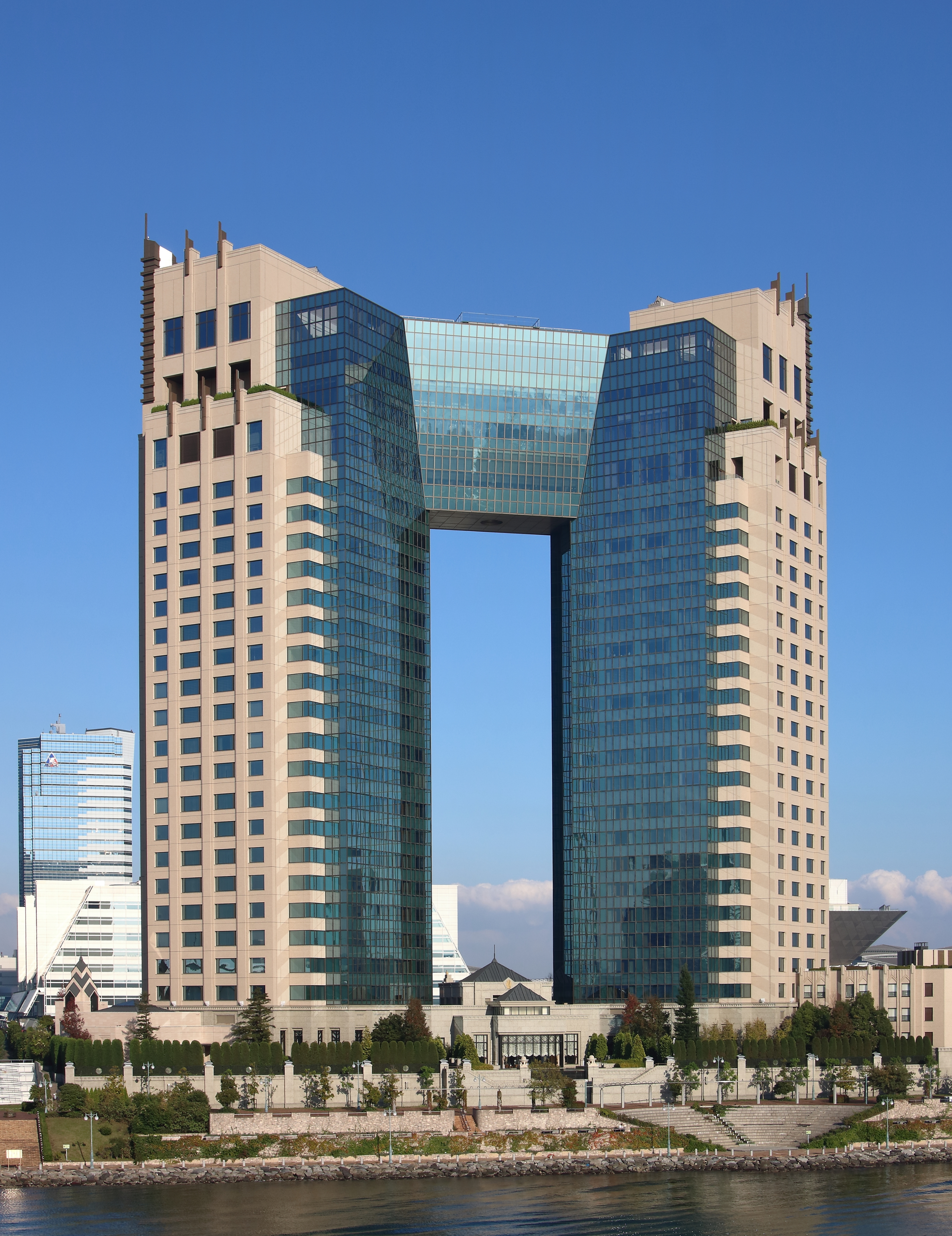 Tokyo Baycourt Club